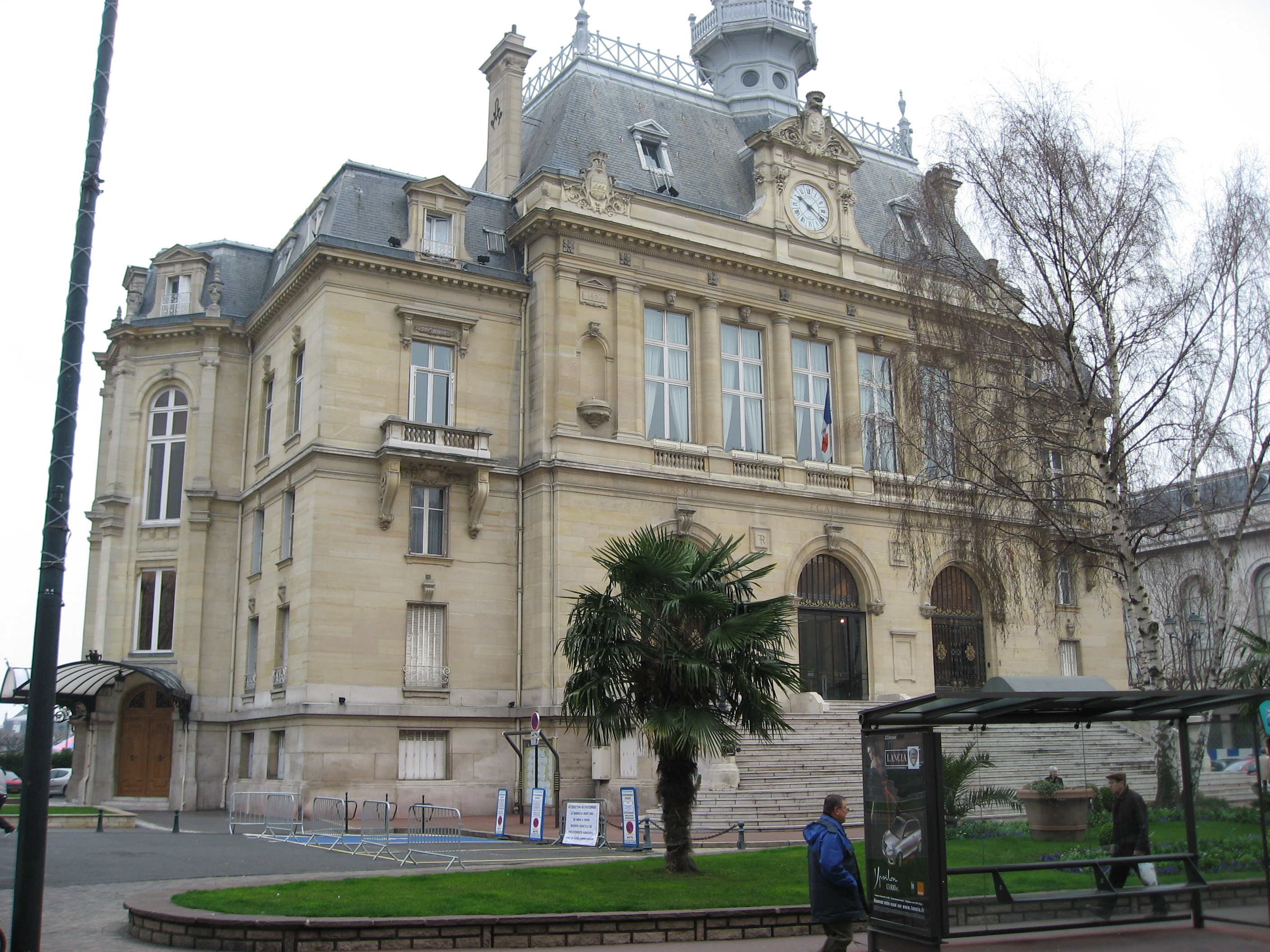 Mairie d'Asnières-sur-Seine